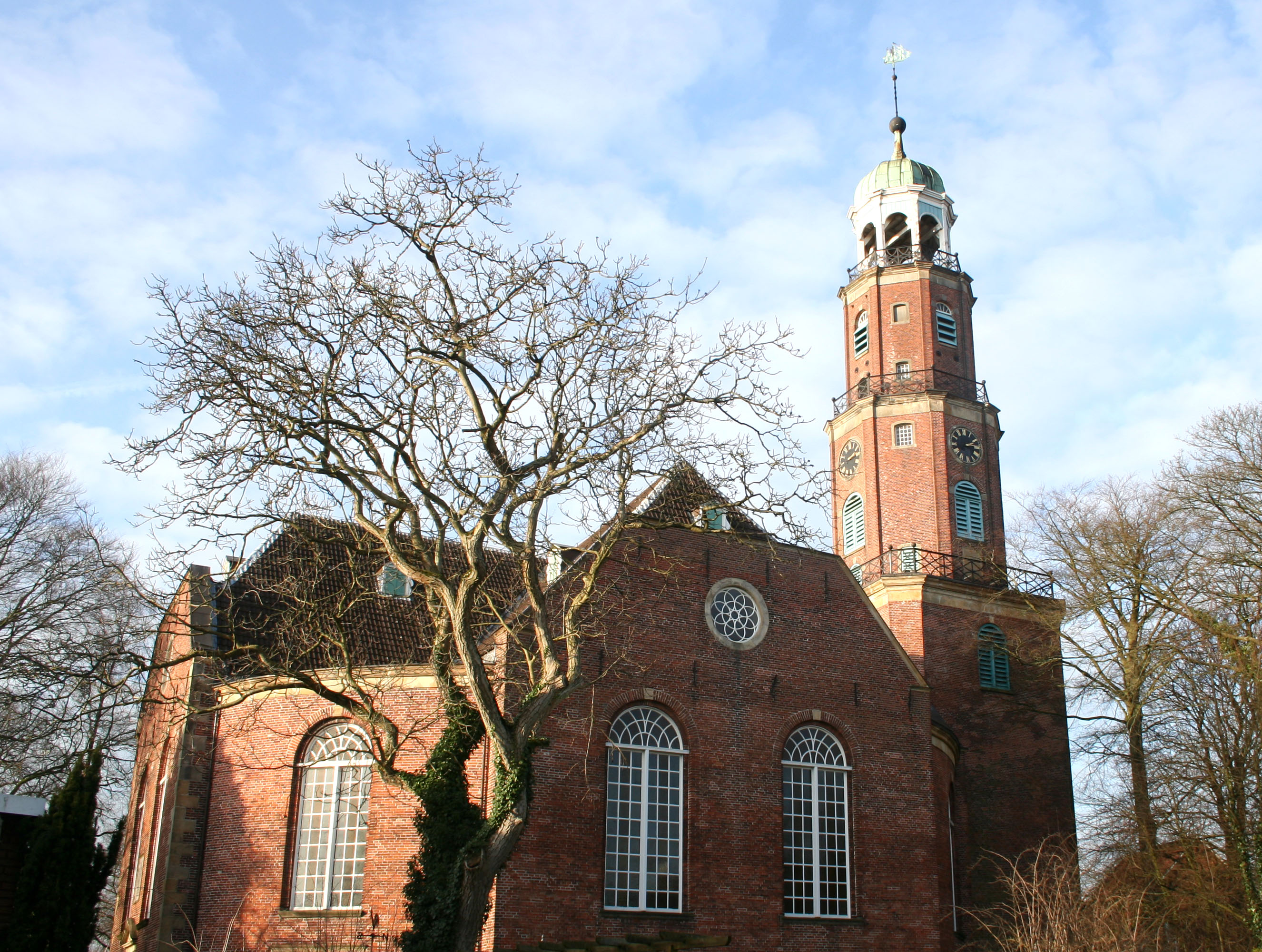 Die "Große Kirche" in Leer, Ostfriesland. Sie ist die Kirche der reformierten Gemeinde in Leer und zudem auch die Hauptkirche der deutschen Landeskirche "Evangelisch-reformierten Kirche - Synode evangelisch-reformierter Kirchen in Bayern und Nordwestdeutschland".